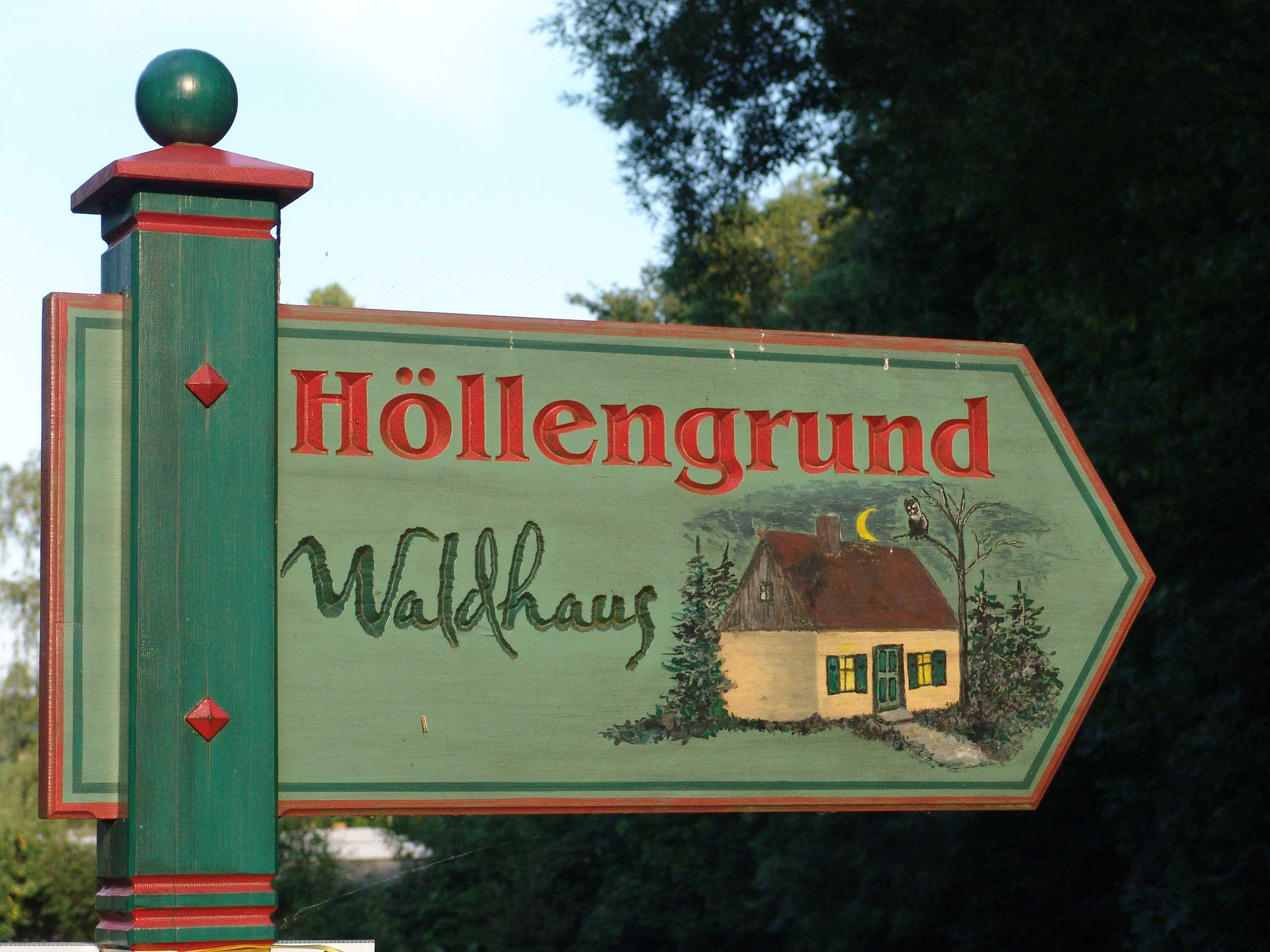 Wegweiser zum Höllengrund in Dürrhennersdorf, Landkreis Görlitz, Sachsen